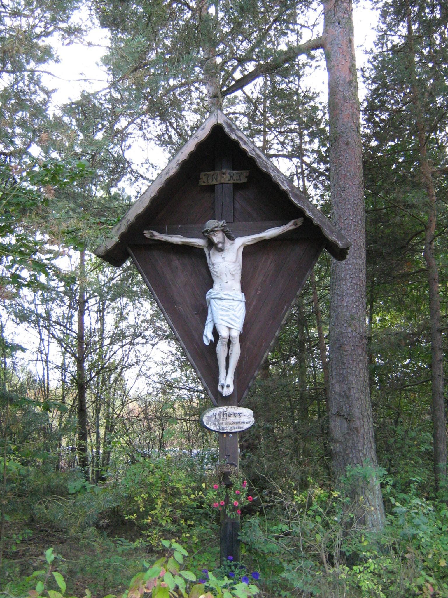 Kreuz am "Roten Kreuz" an der Wiederaufarbeitungsanlage Wackersdorf Inschrift: Oh Herr - bleibe bei uns, denn es will Nacht werden.